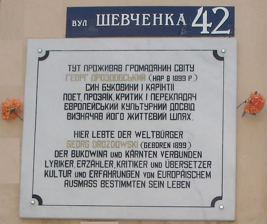 Меморіальна дошка Георгові Дроздовському на будинку в Чернівцях, де він жив